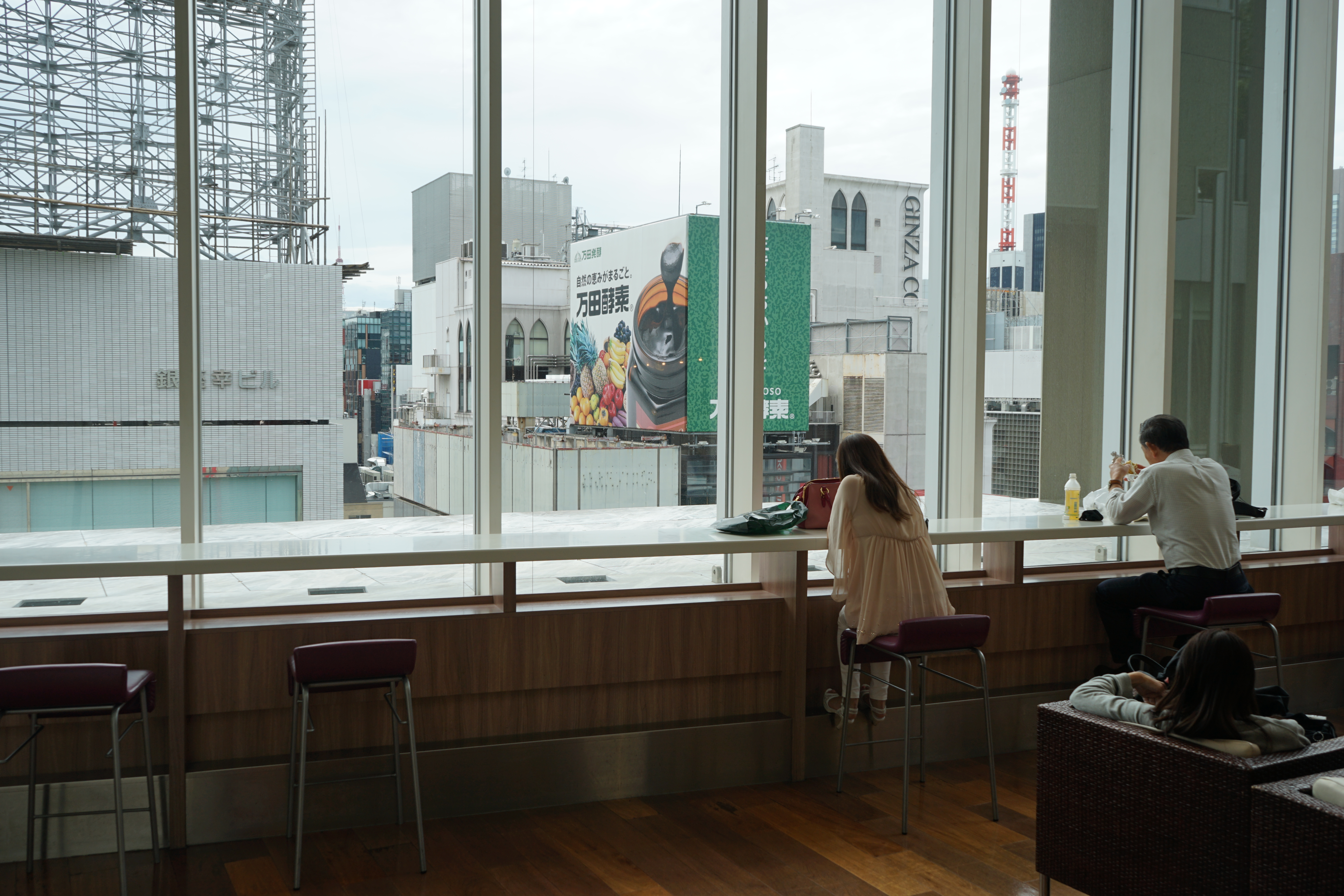 Ventanal